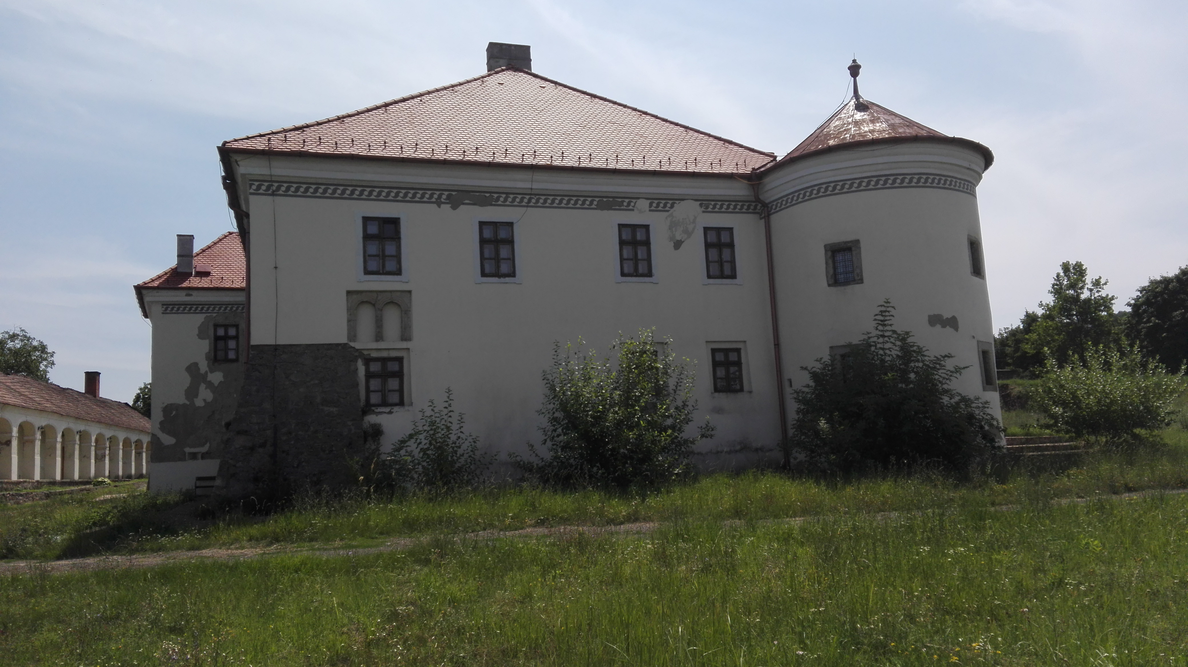 Monaky-kastély, Monok 2.